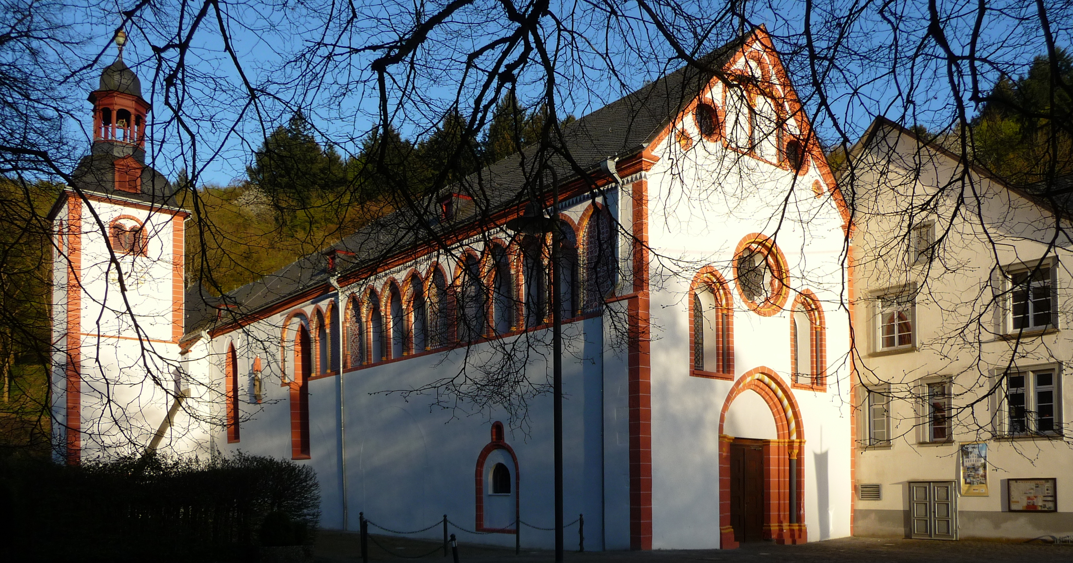 Abteikirche Sayn nach der Renovierung 2015, Nordseite und Westfront